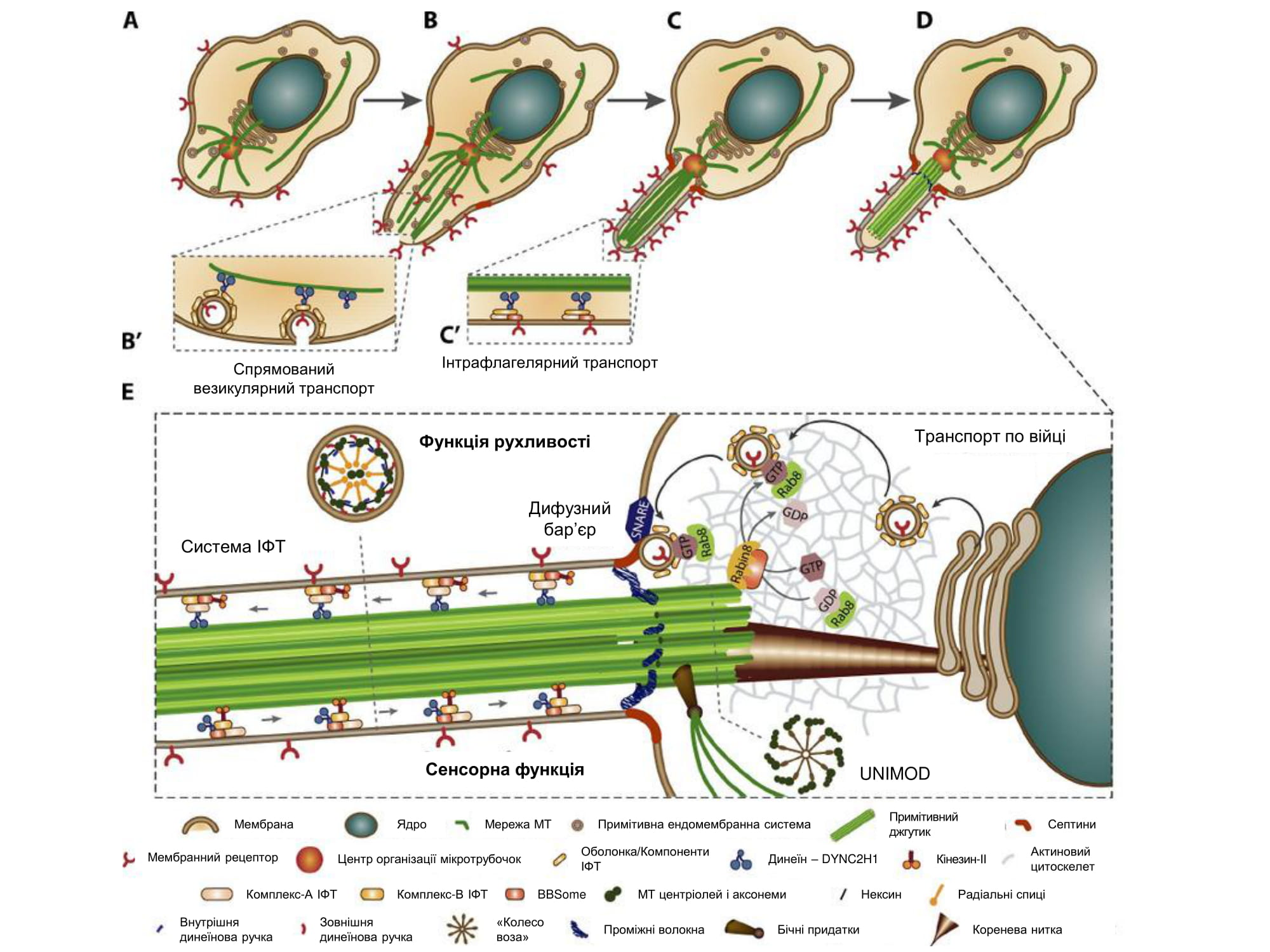 (A) Еукаріотична клітина, в якій розвивалася протовійка, ймовірно, вже мала внутрішньомембранну систему, ядро і цитоскелет із актину та мікротрубочок, що сходилися в ЦОМТ. (B і B’) Спрямований транспорт компонентів клітинної мембрани до певної ділянки плазмолеми, яка почала випинатися через спрямований ріст мікротрубочок, закріплених на ЦОМТ. Таке випинання могло перетворитися на спеціалізовану структуру із мембраною специфічного складу (підтримувався дифузійним бар'єром). (C) Новоутворена протовійка, скоріше за все, здійснювала ковзаючі рухи та сенсорну функцію, що сприяло подальшому розвитку органели. (C’) До збирання структури була залучена система інтрафлагелярного транспорту. (D) Далі розвивався пучок мікротрубочок, який формував спеціфічну композицію закритих і відкритих мікротрубочок, утворюючи структуру із симетрією 9-го порядку, здатну до згинання завдяки наявності молекулярних моторів. (E) Отже, предкова війка могла мати наступні характеристики: (a) центріоль/базальне тіло із симетрією 9-го порядку, утворене триплетами мікротрубочок, «колесом воза», бічними придатками та набором білків – UNIMOD (UNIversal MODule); (b) аксонема з моторною і сенсорною функціями, складена з дев'яти дуплетів, центральної пари мікротрубочок, зовнішніх та внутрішніх динеїнових ручок, що підтримувалося системою інтрафлагелярного транспорту; (c) спеціалізована мембрана, утворена дифузійним бар'єром як на рівні мембрани, так і на рівні дифузії компонентів у перехідній зоні; (d) спрямований транспорт мембрани та інших компонентів від апарату Гольджі до основи війки.